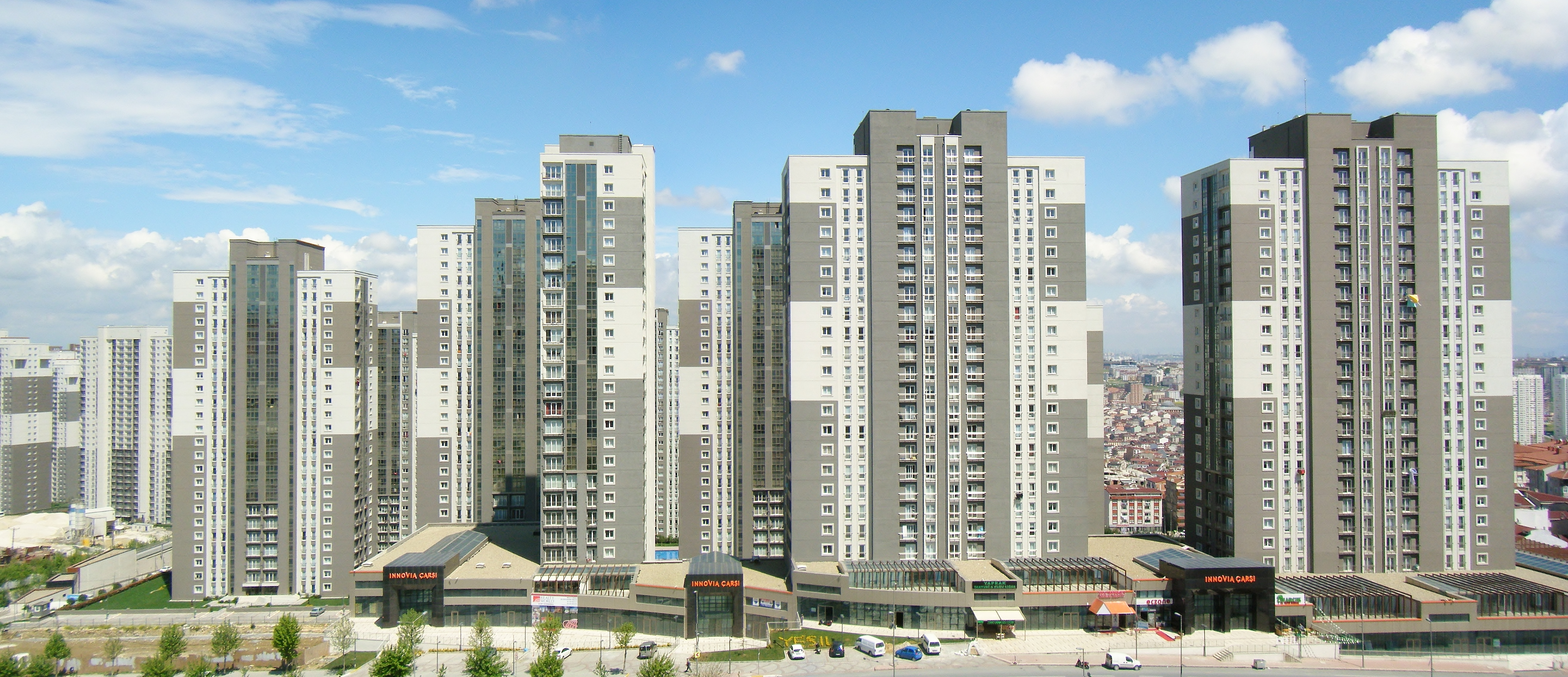 Innovia 2 Sitesi Beylikduzu Esenyurt Bolgesi